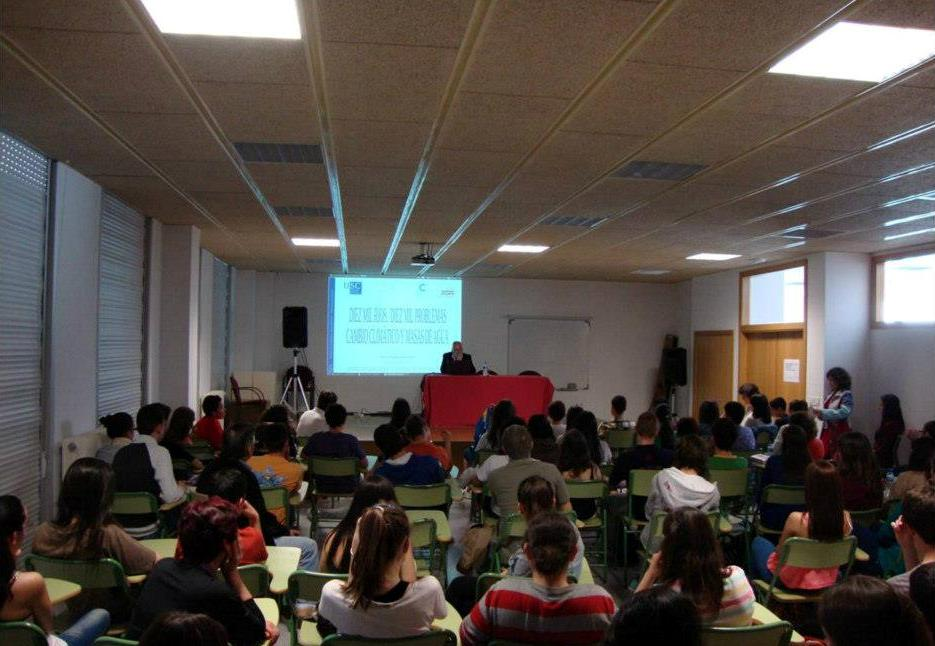 Conferencia "Dez mil ríos, dez mil problemas" en el Instituto de Educación Secundaria de BriónGalego: Conferencia "Dez mil ríos, dez mil problemas" no Instituto de Educación Secundaria de Brión